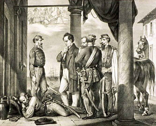 20 luglio 1860. Garibaldi si riposa dopo la battaglia, nell'abitato di Milazzo. Ridotto, ritoccato, litografia